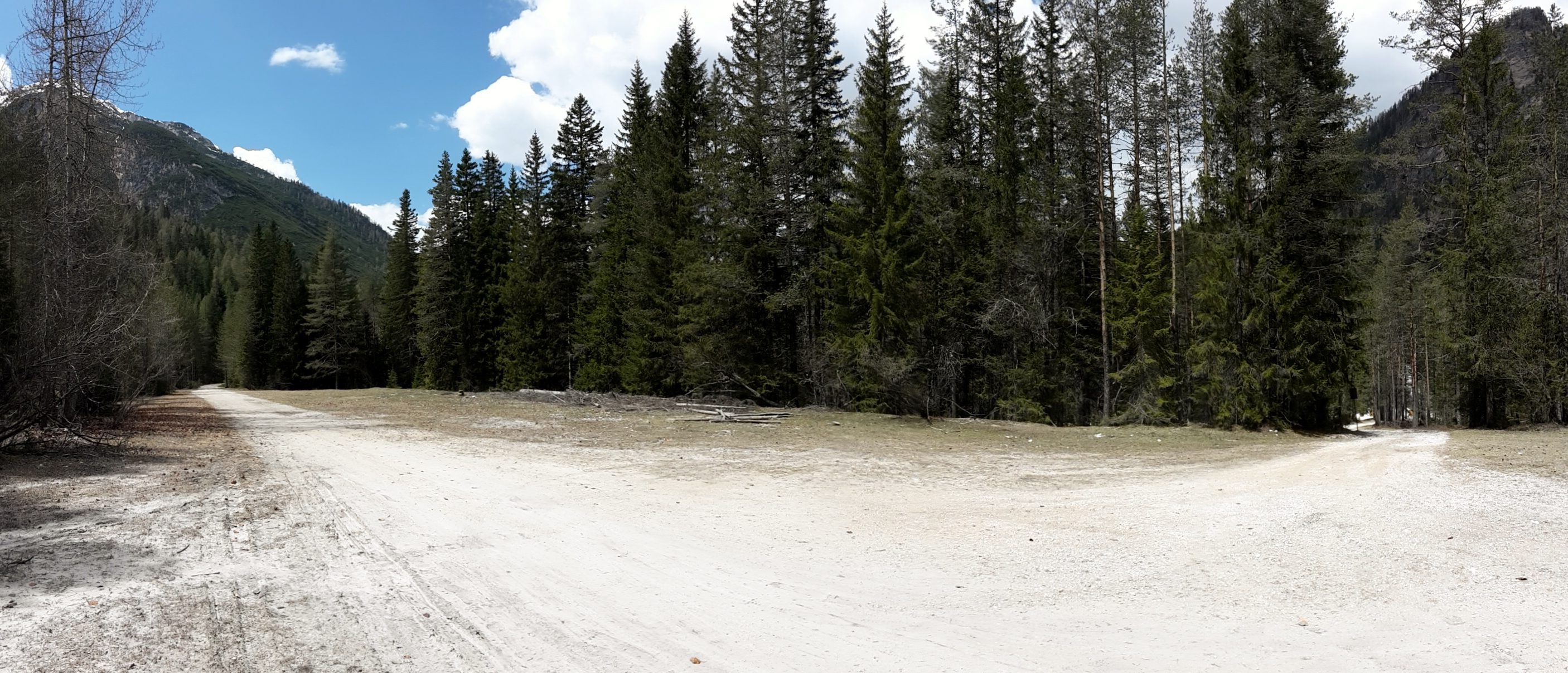 Resti della stazione di Carbonin